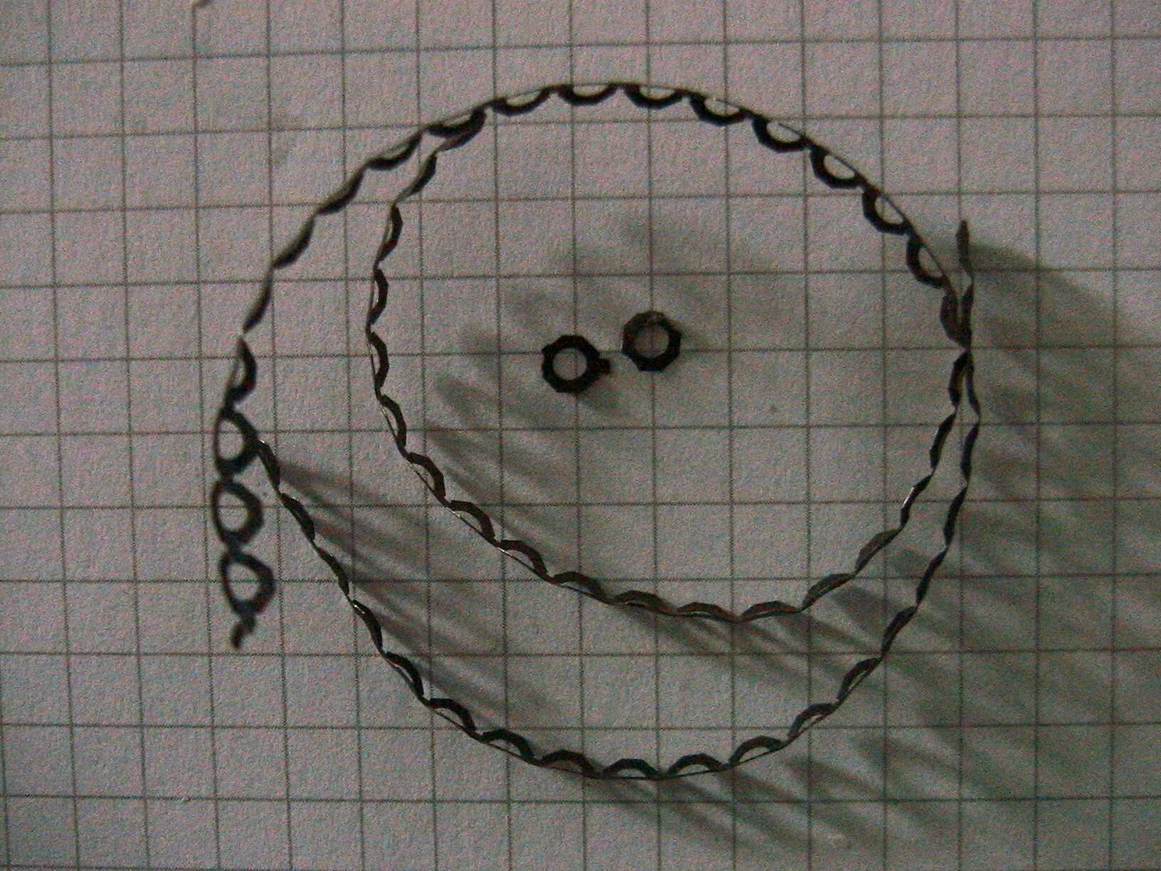 Federscheiben im unvollständigen Schnitt, an Montagestelle vom Coil getrennt und direkt gefügt